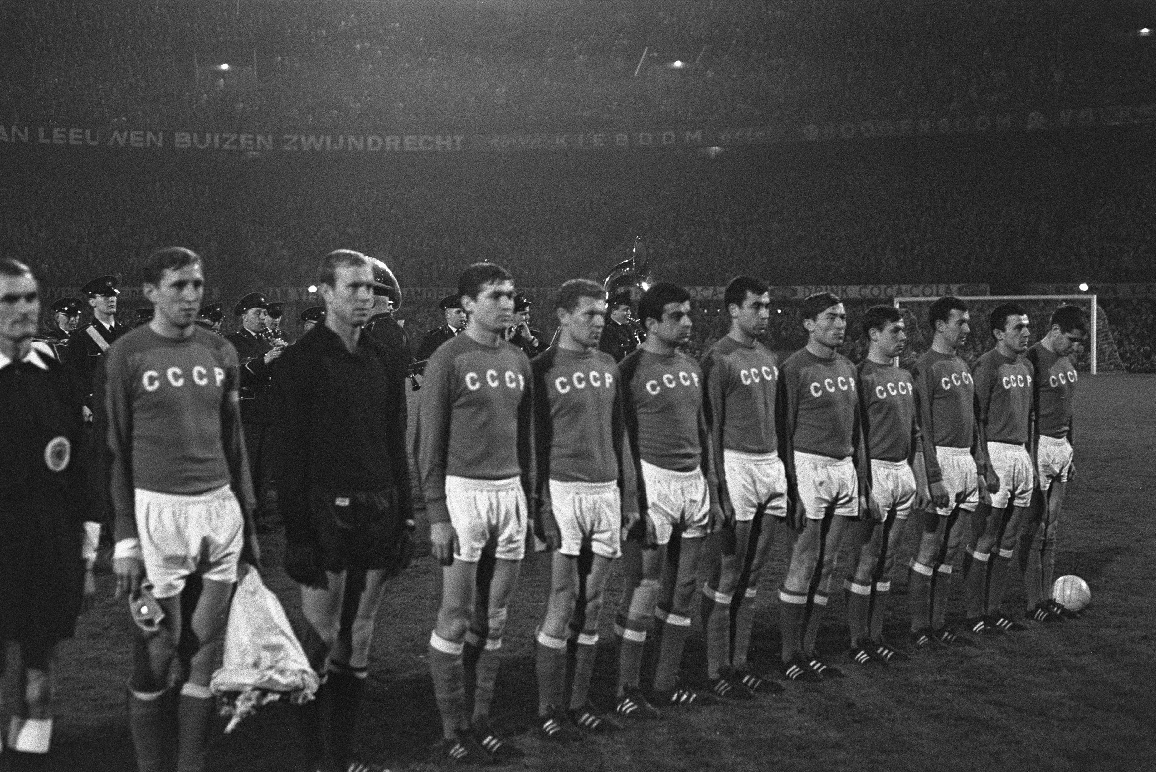 Collectie / Archief : Fotocollectie Anefo Reportage / Serie : [ onbekend ] Beschrijving : Nederland tegen Rusland 3-1 te Rotterdam. Russisch elftal Datum : 29 november 1967 Locatie : Rotterdam, Zuid-Holland Trefwoorden : elftallen, sport, voetbal Fotograaf : Nijs, Jac. de / Anefo Auteursrechthebbende : Nationaal Archief Materiaalsoort : Negatief (zwart/wit) Nummer archiefinventaris : bekijk toegang 2.24.01.05 Bestanddeelnummer : 920-8906